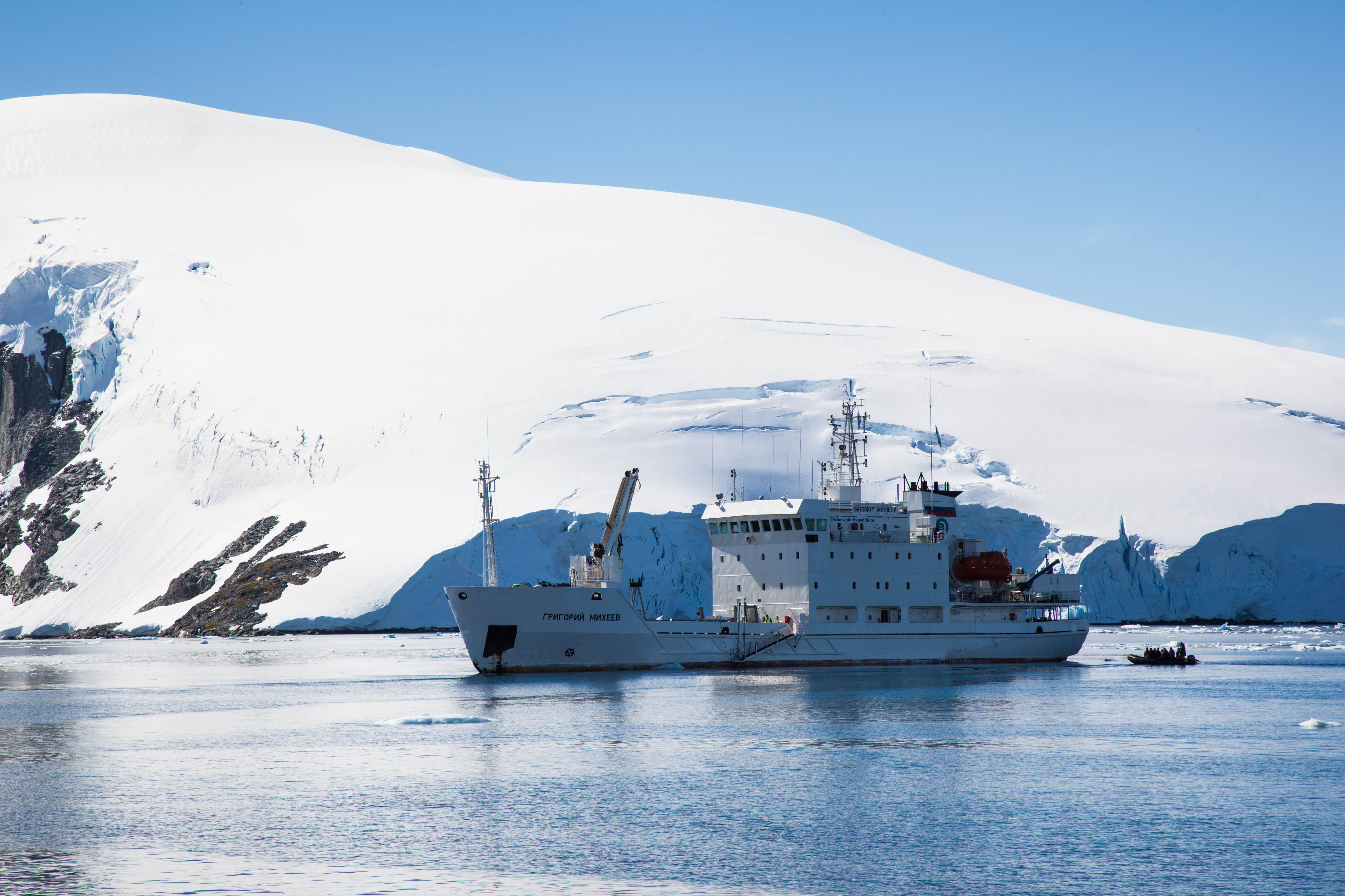 20090117-IMG_1079.jpg